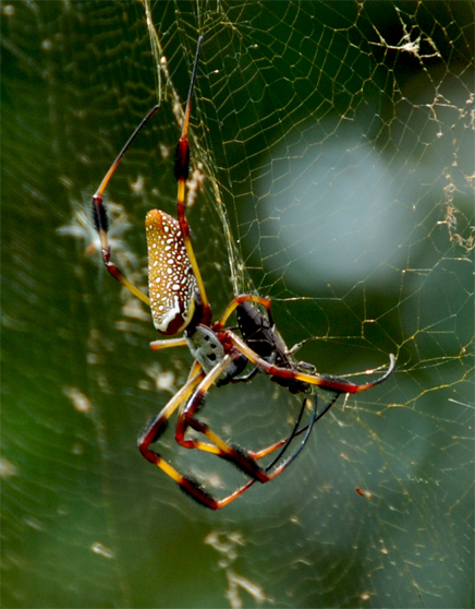 Nephila clavipes female